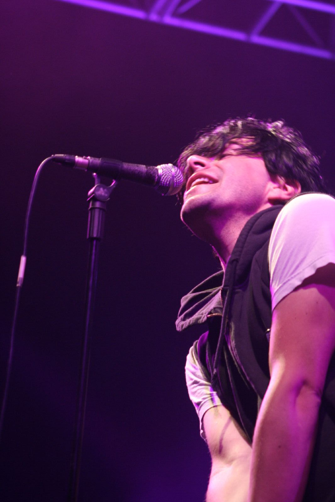 The Charlatans, Eólica 2007 (Tenerife, Canarias, España)